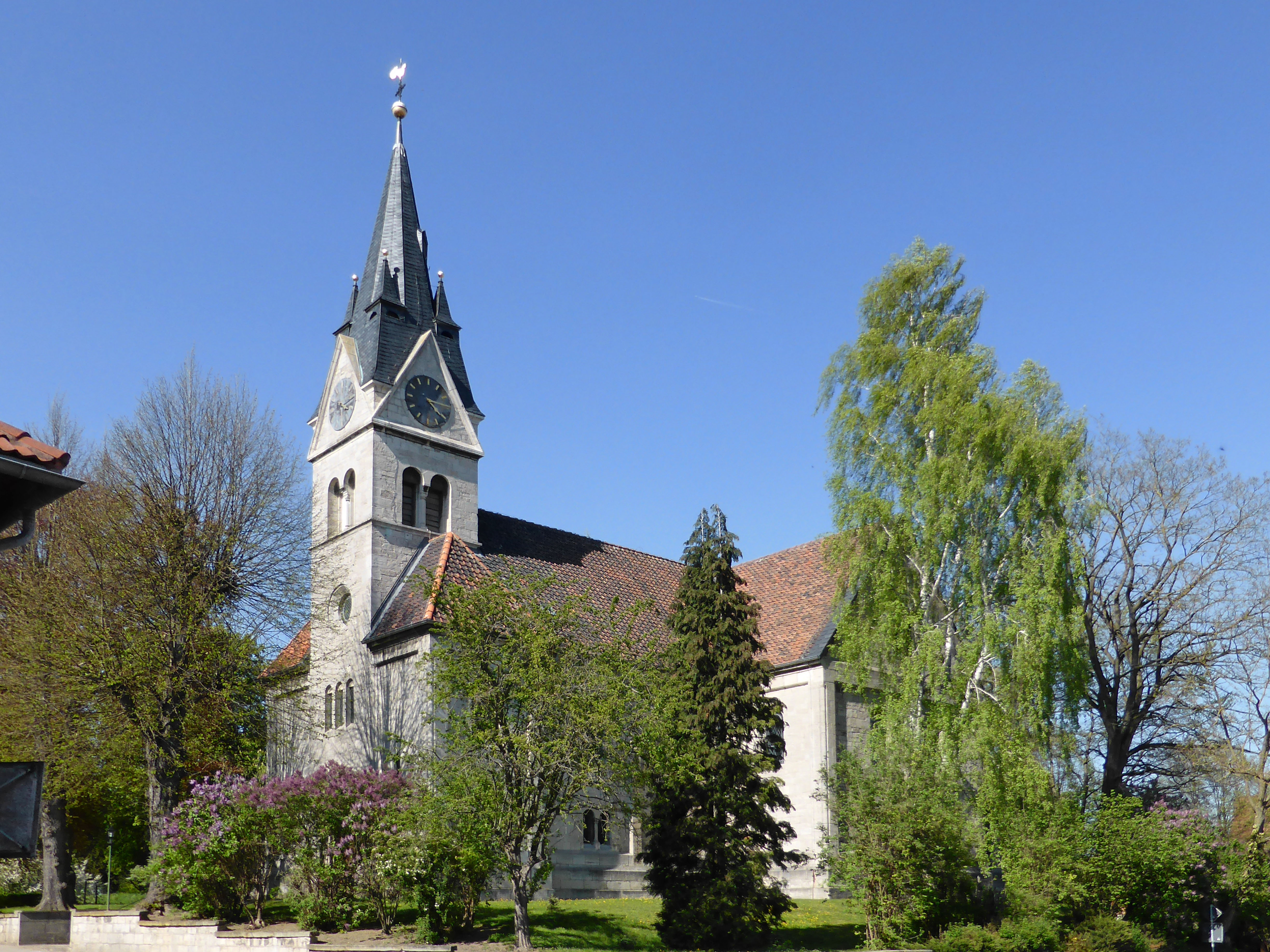 Evangelisch-lutherische St.-Vitus-Kirche in Frellstedt.